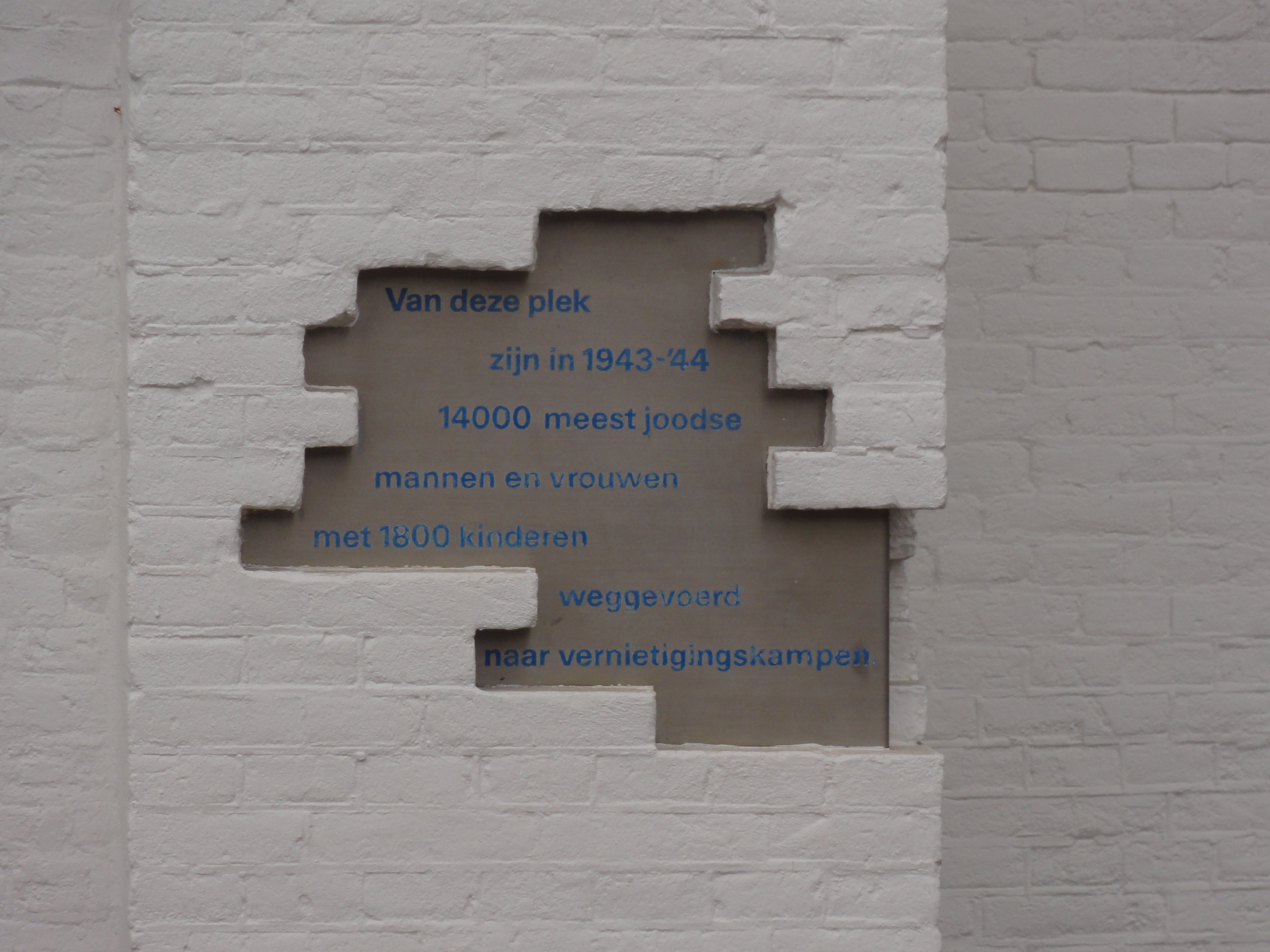 Station Vught, metselwerk tekst 14000 joden gedeporteerd